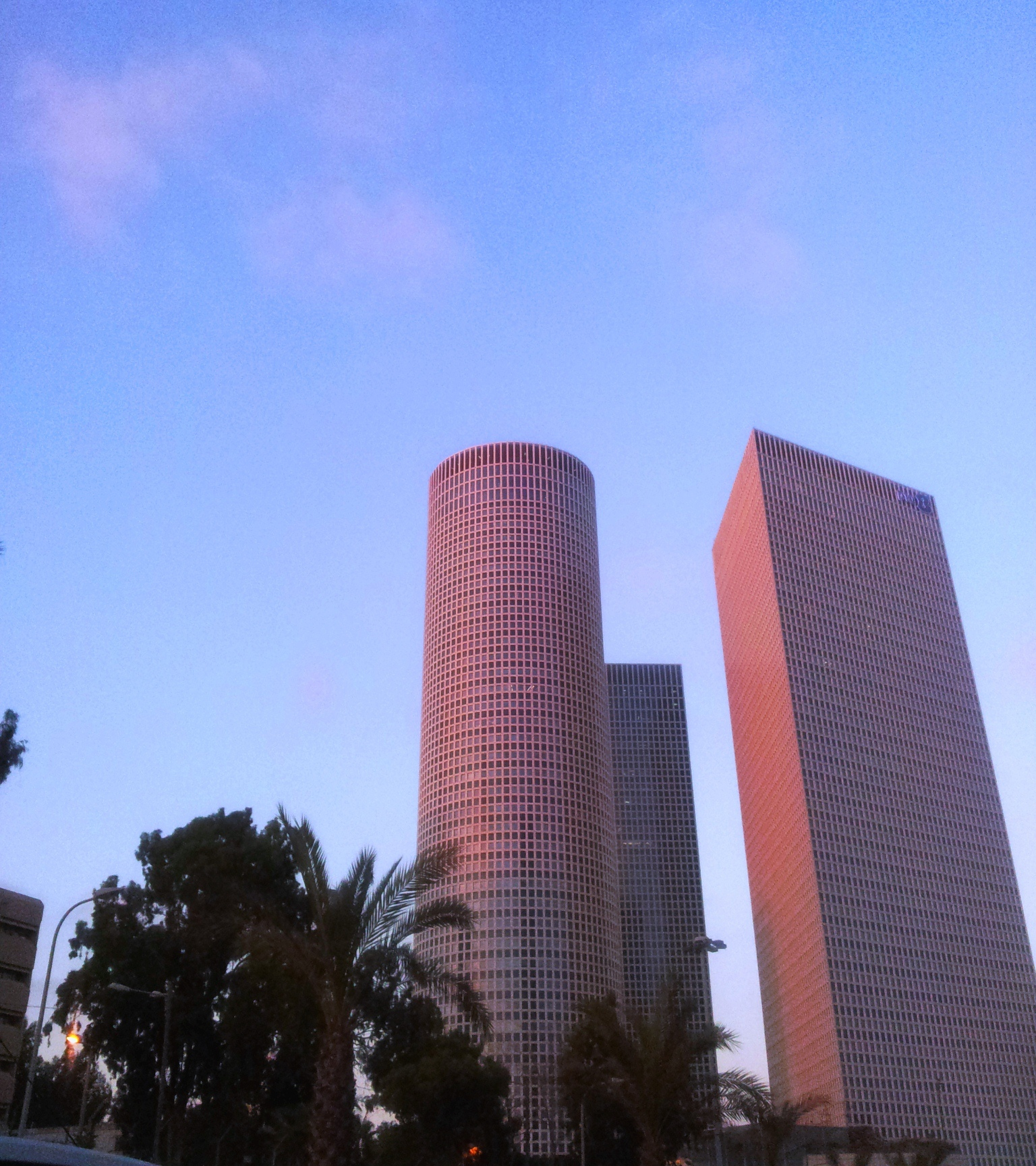 מגדלי עזריאלי בתל אביב לפנות ערב